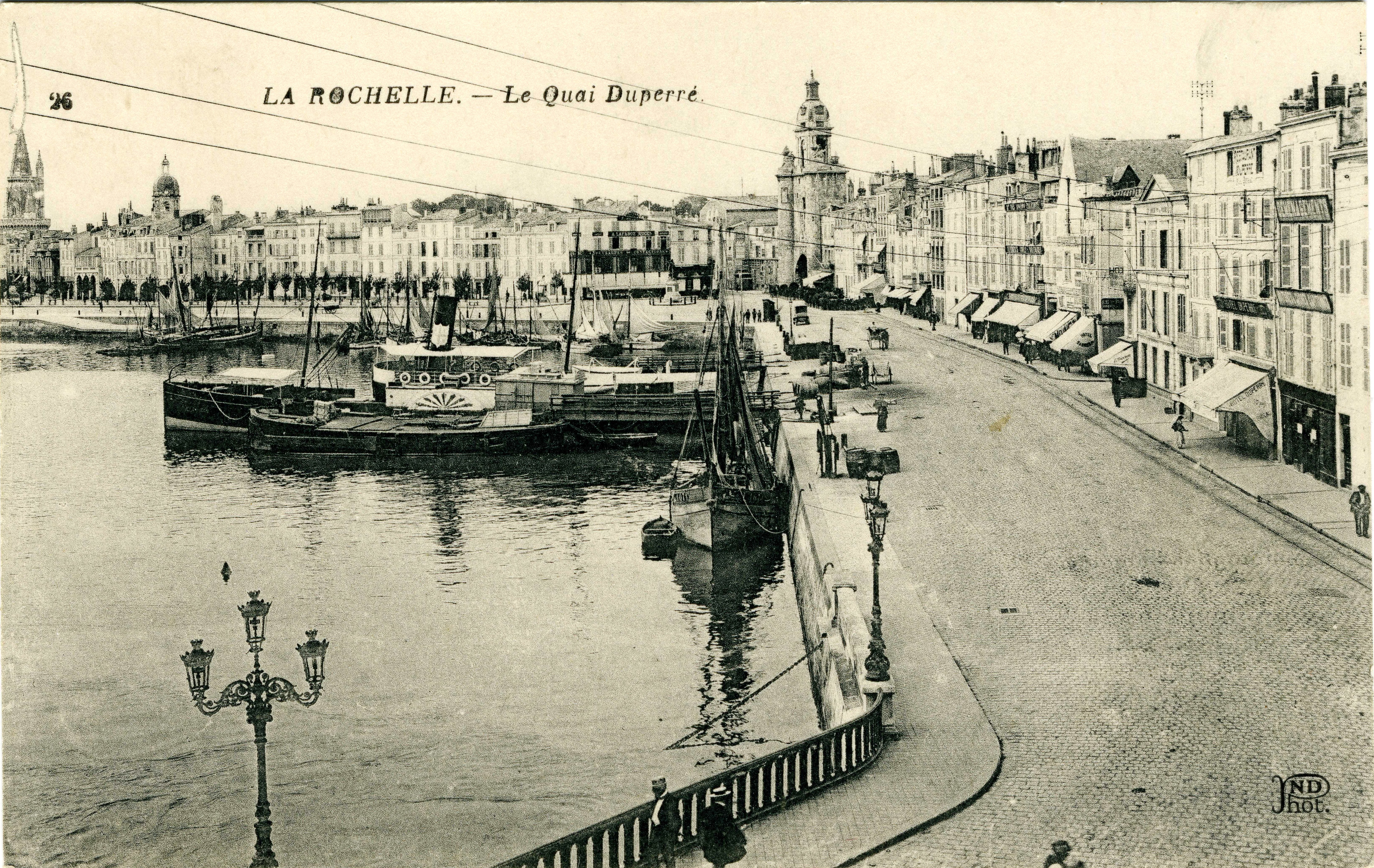 Le port de La Rochelle: le quai Duperré et la Grosse Horloge. La Rochelle, Charente Maritime, France. Années 1920?